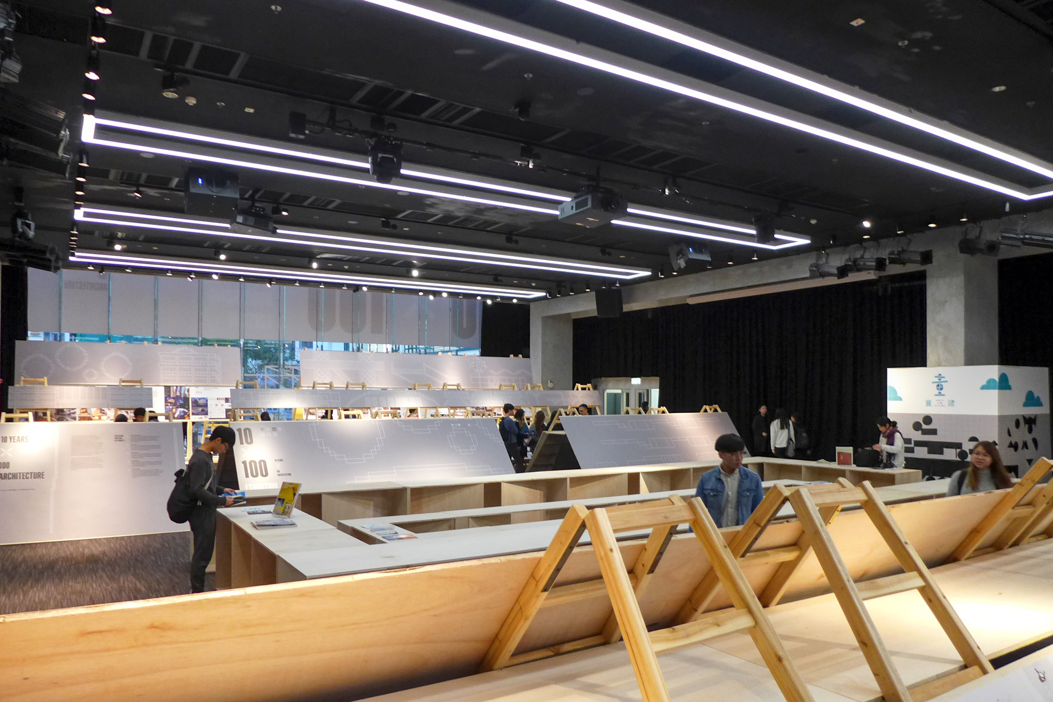 PMQ QUBE Interior